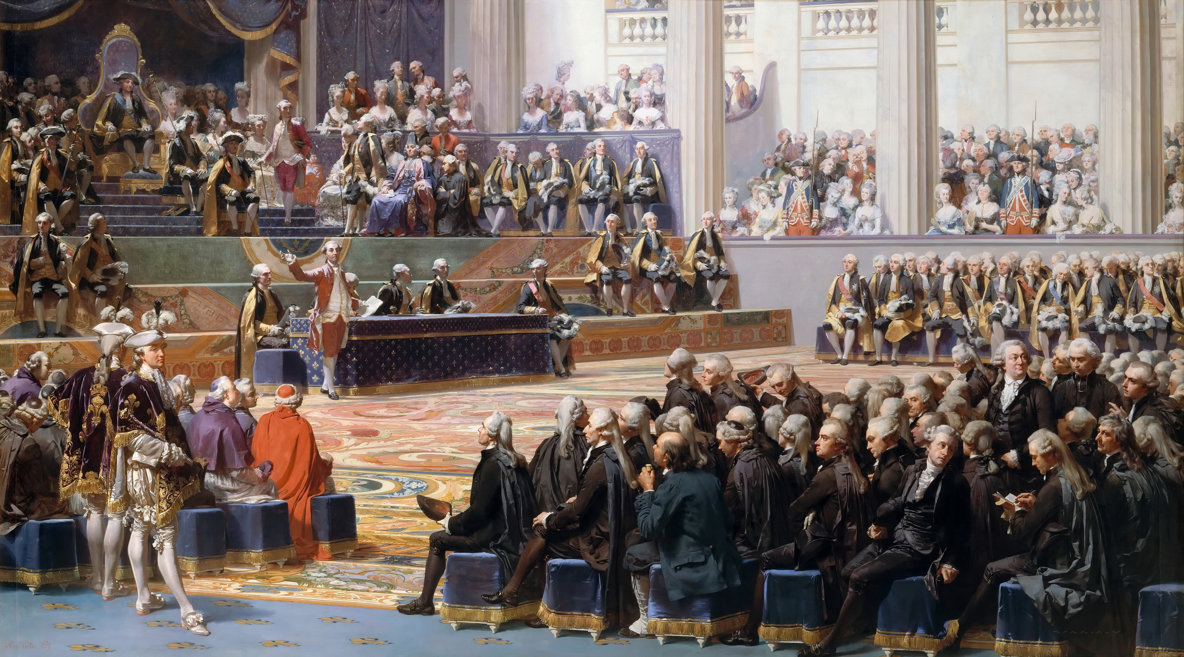 Inaugurazione degli Stati Generali, 5 maggio 1789, olio su tela, 400 x 715 cm, Versailles, Musée national du château et des Trianons